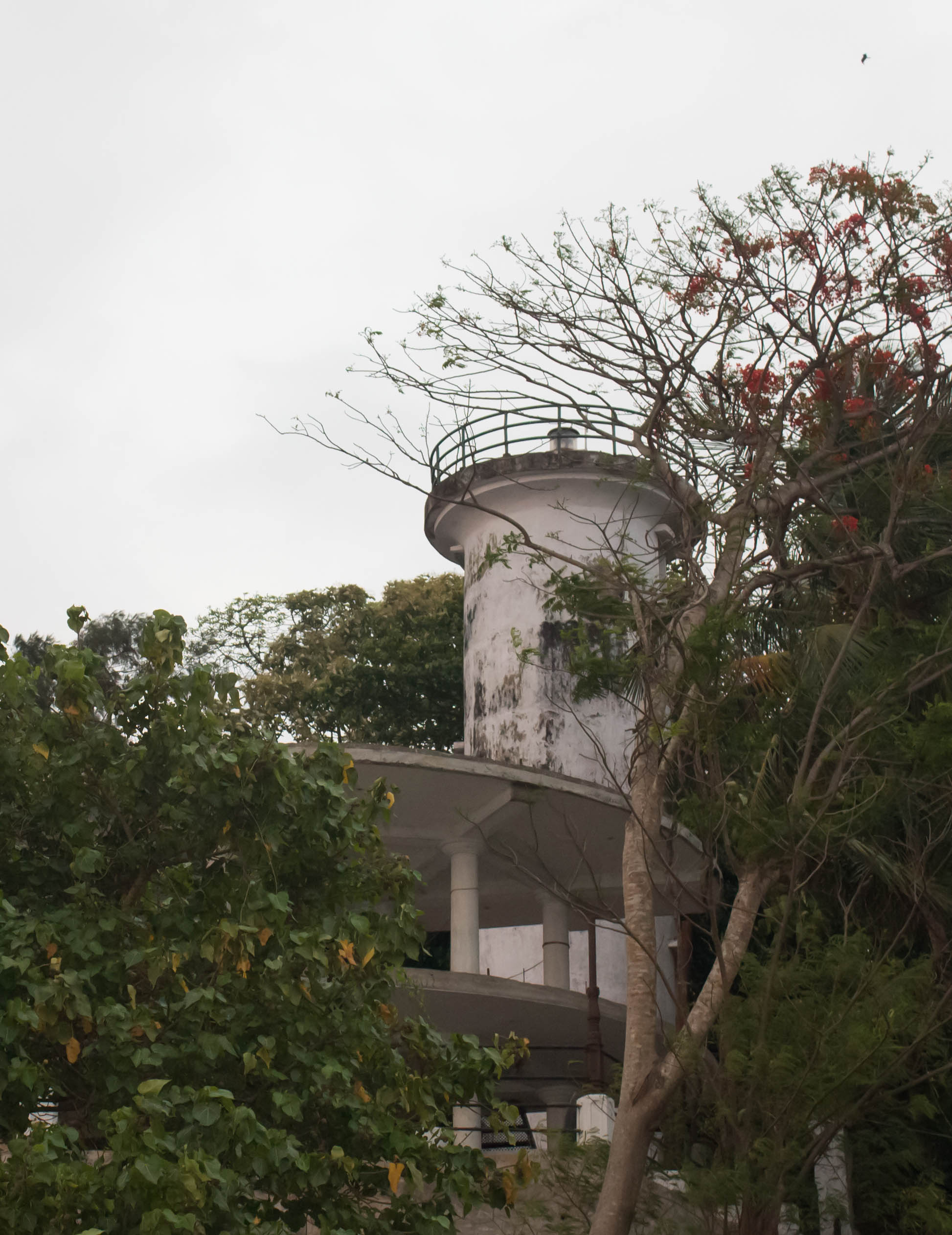 മാഹി വിളക്കുമാടം